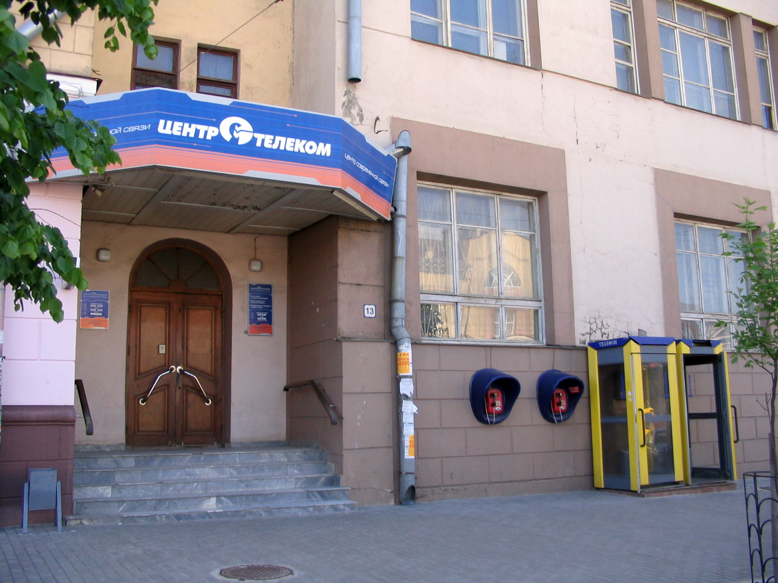 отделение Ивтелекома (пр. Ленина, Иваново)